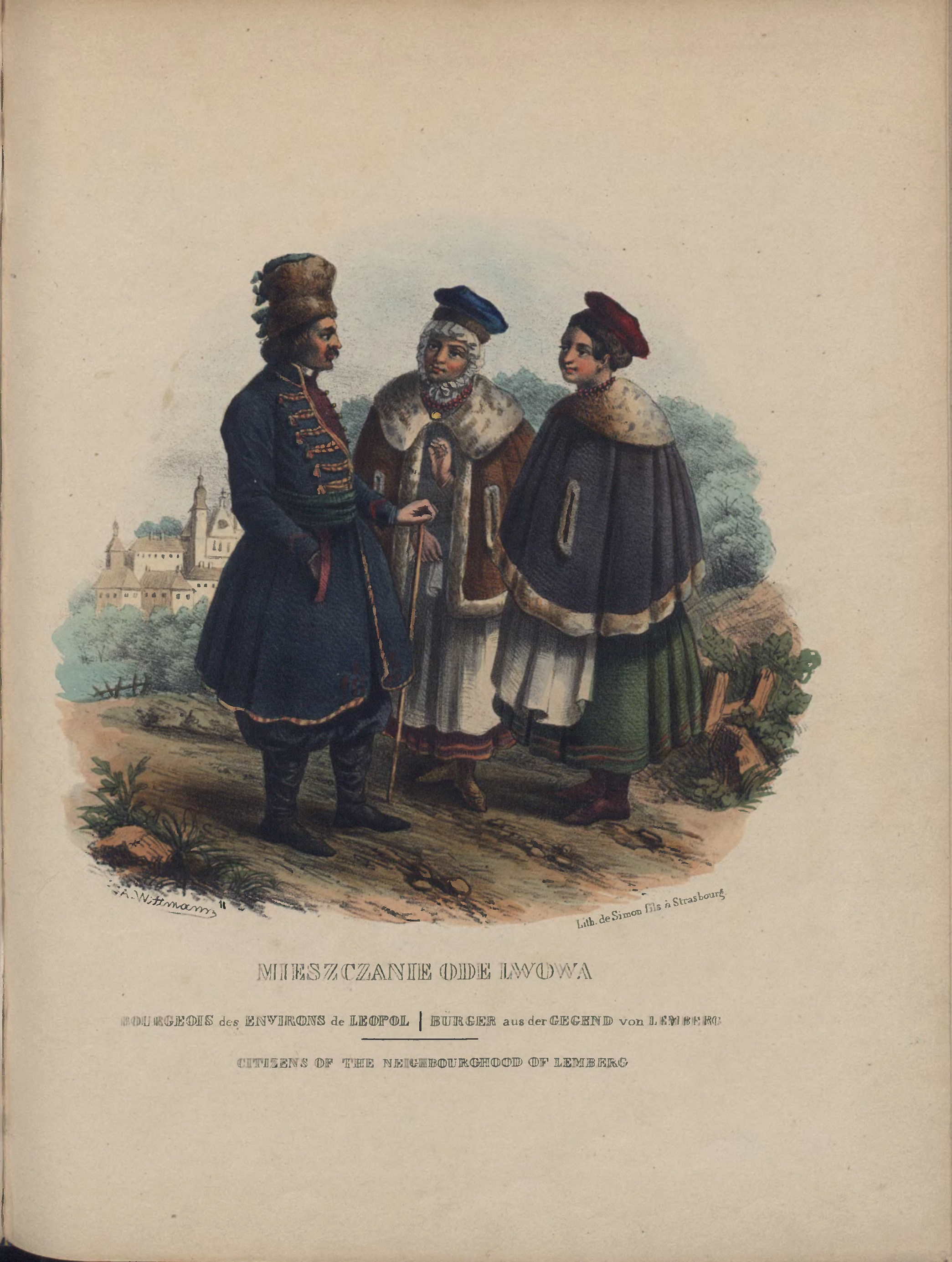 Міщани зі Львова. Ukrainian. Lviv.